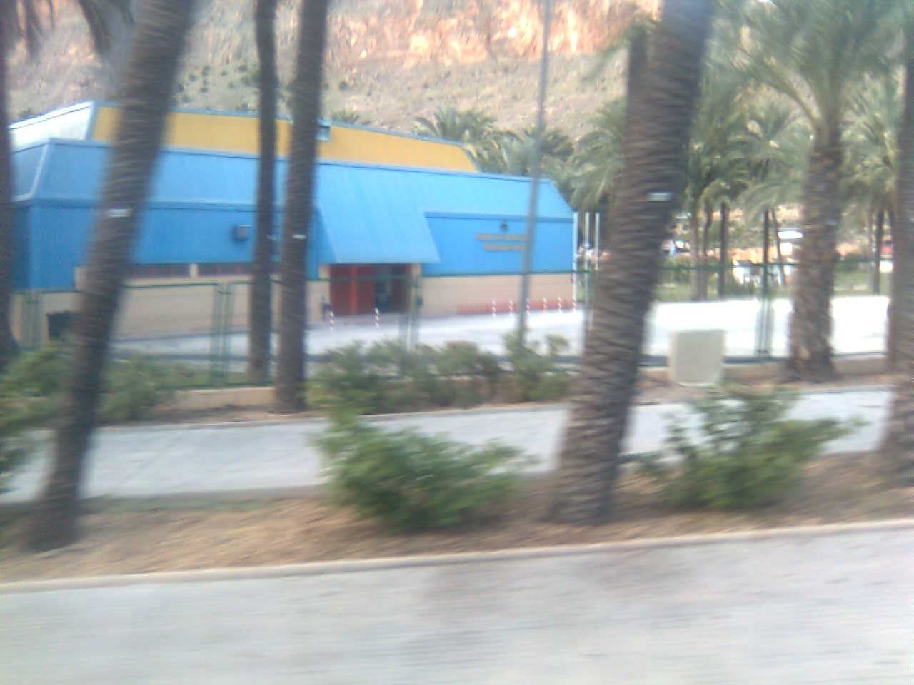 Pavellón de deportes Bernardo Ruiz, Orihuela